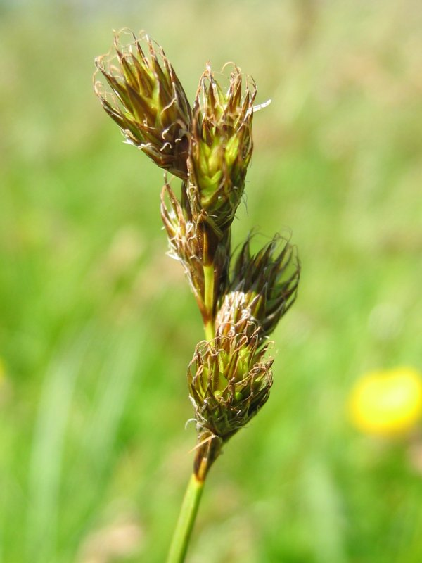 Hasenpfoten-Segge Carex ovalis, uppn Darß